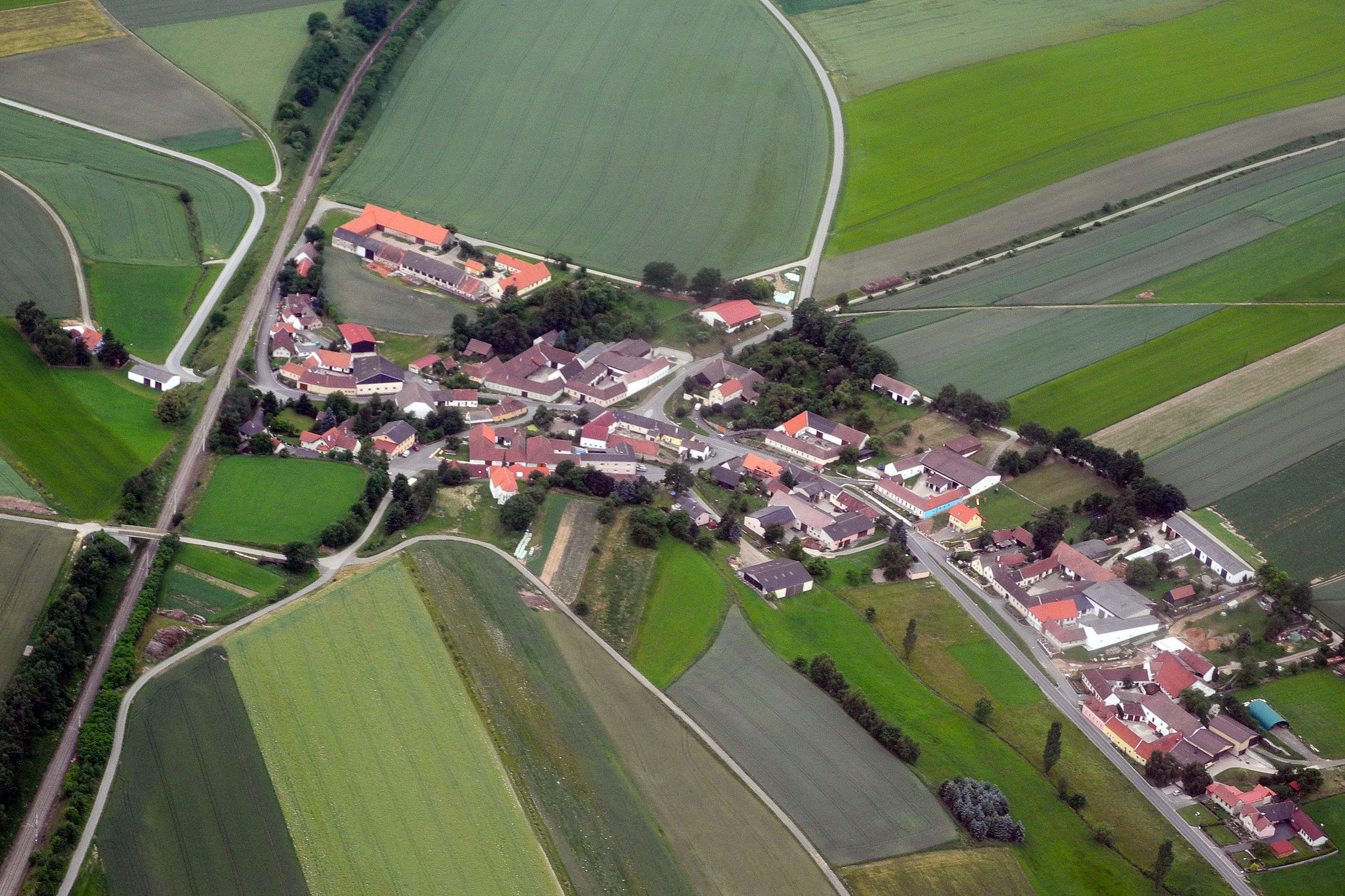 VFR Ostösterreich: Wappoltenreith